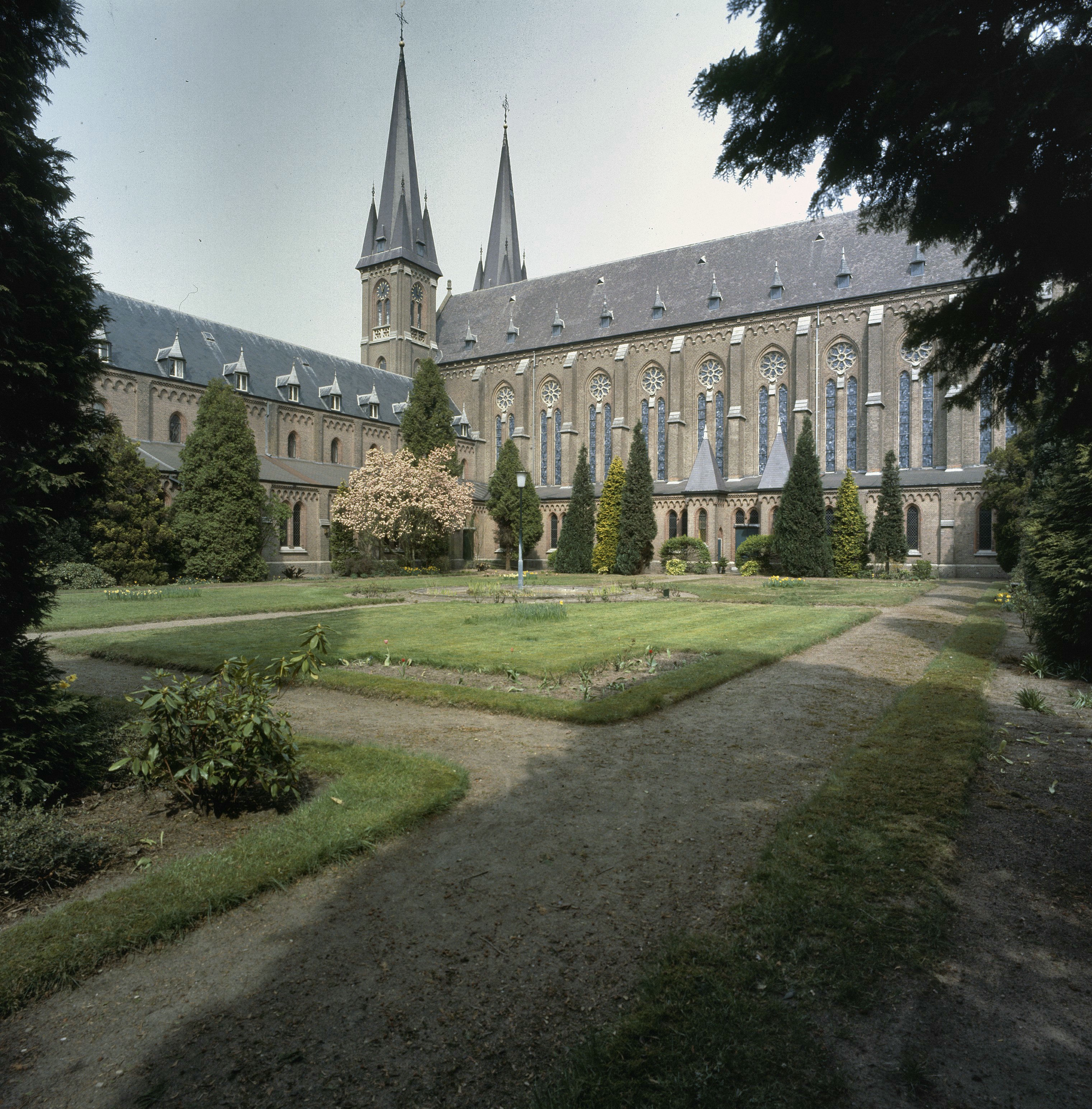 Trappistenklooster: Overzicht met zuidgevel abdijkerk (opmerking: Gefotografeerd voor Monumenten In Nederland Noord-Brabant)